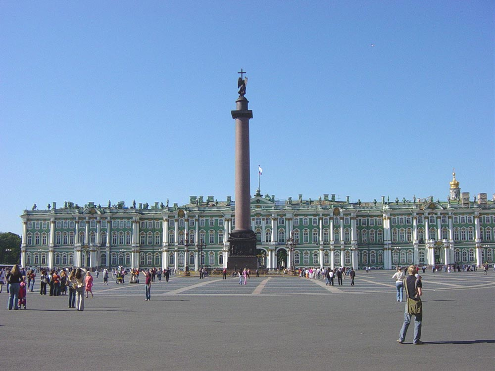 מראה ארמון החורף ועמוד אלכסנדר מן הכיכר